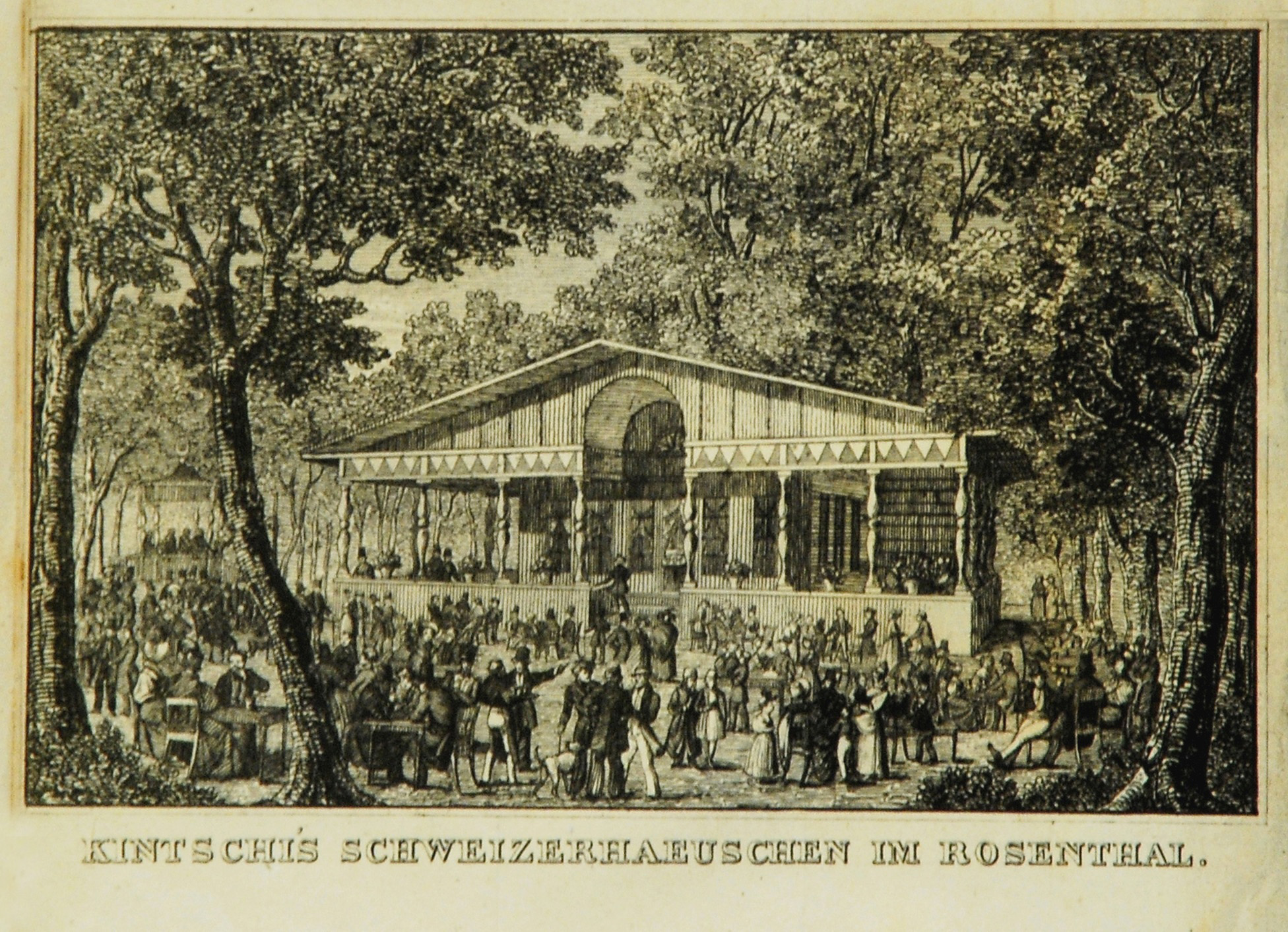 Ausflugslokal "Schweizerhäuschen" im Rosental bei Leipzig um 1839. Lithographie, Darstellung 8,3 x 13 cm. Künstler unbekannt.